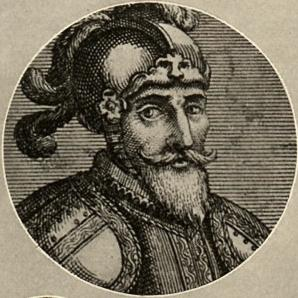 Alonso de Alvarado, mariscal y conquistador español.